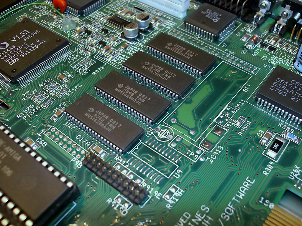 Amiga 1200 RAM Chips